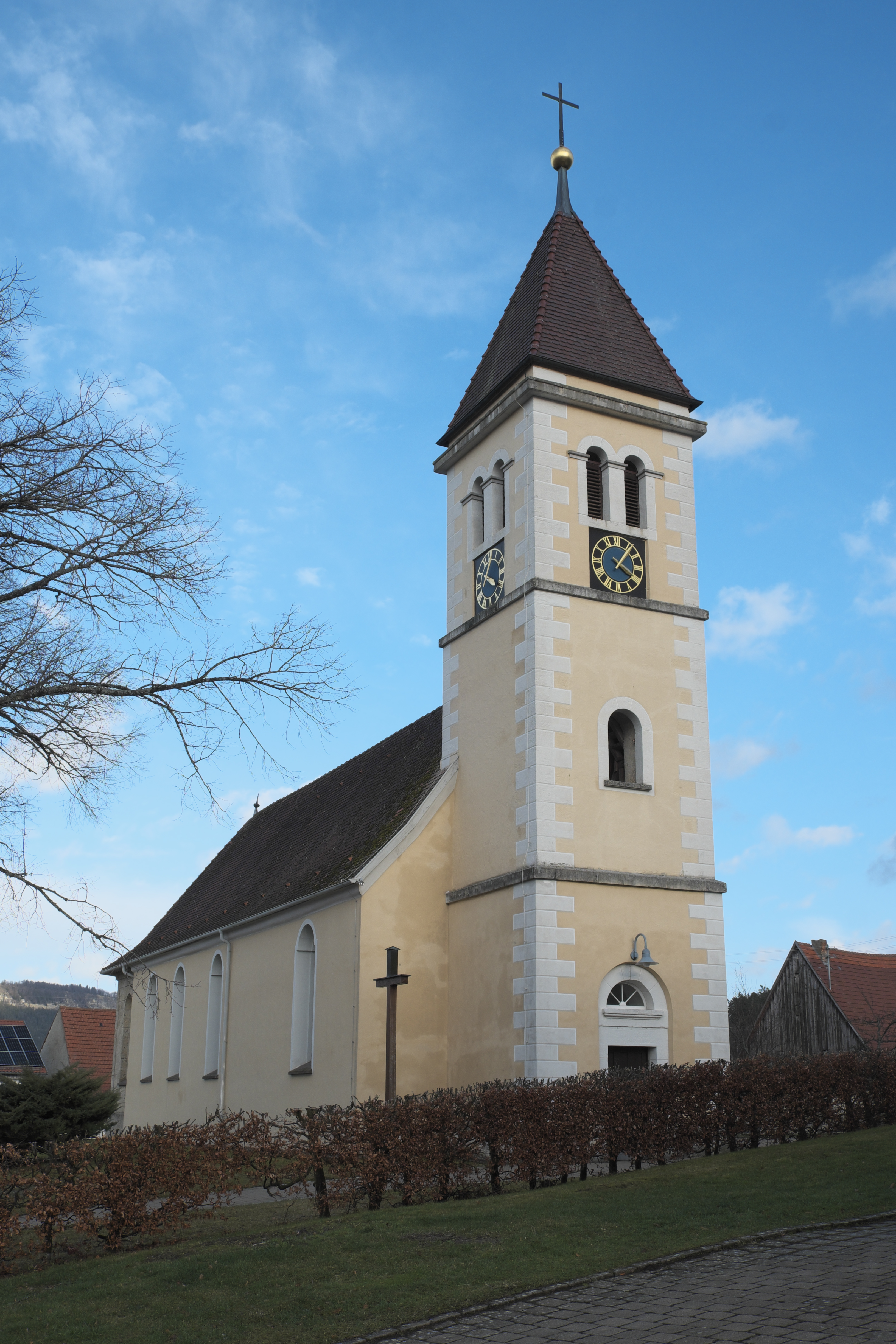 Kirche St. Nikolaus in Weilen unter den Rinnen im Zollernalbkreis (Baden-Württemberg/Deutschland)